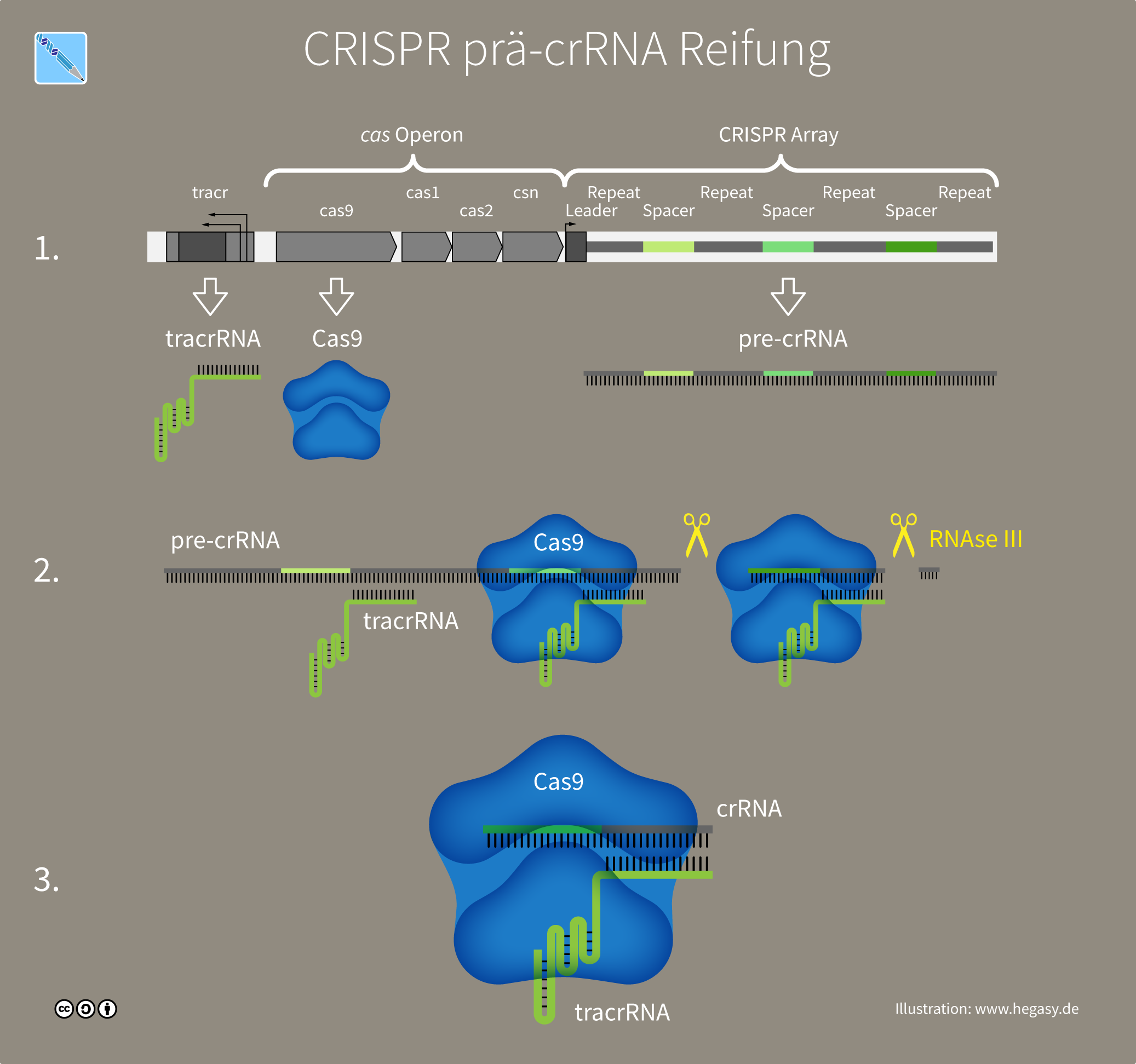 Transkripte des CRISPR Gen-Locus und Reifung der pre-crRNA. 1. Der CRISPR Gen-Locus von S. pyogenes besteht aus dem cas Operon, einem CRISPR Array und Genen, die für transaktivierende crRNA codieren (tracrRNA). tracrRNA, Cas9 RNA und pre-crRNA werden vom Genlocus transkribiert. tracrRNA bildet eine Struktur mit 3 Loops aus, und Cas9 Protein wird synthetisiert. 2. Da pre-crRNA als durchgehender Strang synthetisiert wird, erfolgt ein Reifungsprozess. tracrRNAs paaren sich mit den Repeat-Sequenzen der pre-crRNA. Cas9 Protein formt einen Komplex mit pre-crRNA und tracrRNA. Einzelne Komplexe werden durch Spaltung mittels RNAse III freigesetzt. 3. Der synthetisierte Interferenz-Komplex besteht aus Cas9 und einem Duplex aus tracrRNA und crRNA.